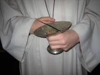 Messdiener mit Schiffchen (Navikulum)